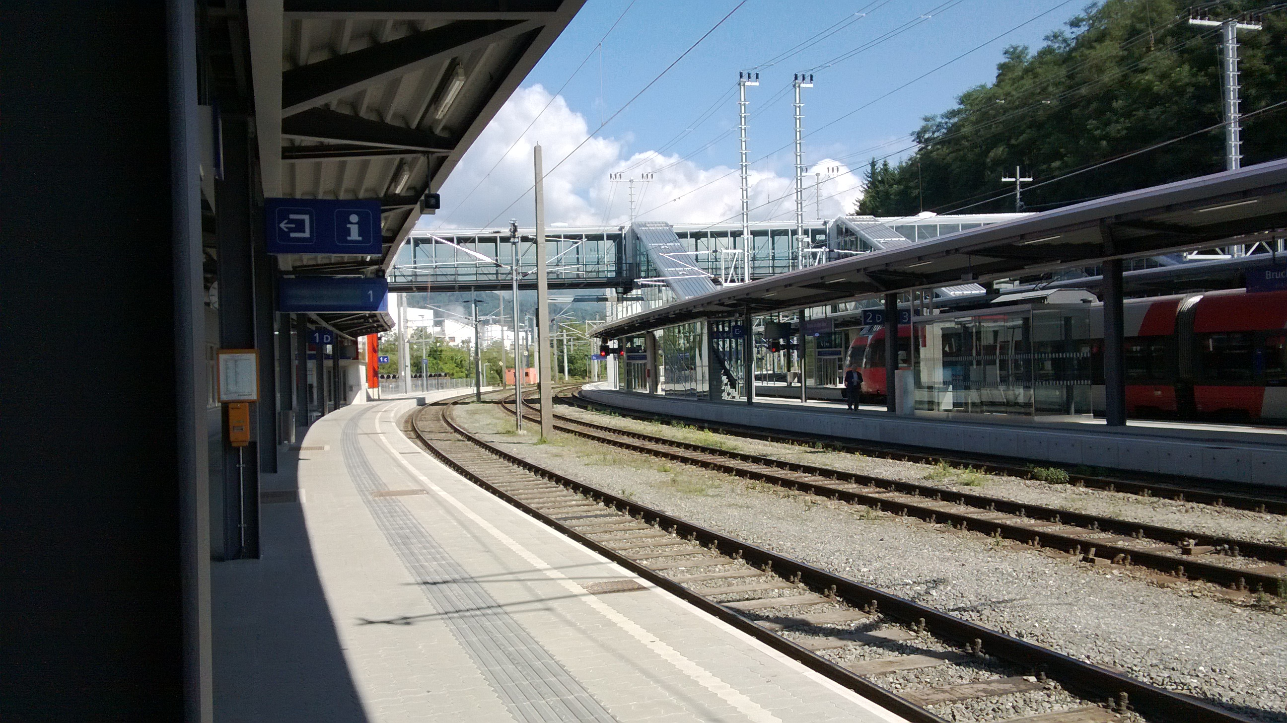 Der neue Bahnhof Bruck an der Mur - Bahnsteig 1 und Fußgängerbrücke